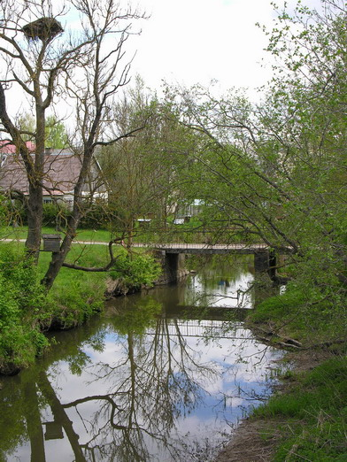 Kvistė, upė Mažeikių raj. Foto: Algirdas, 2006 m. gegužės 17 d.